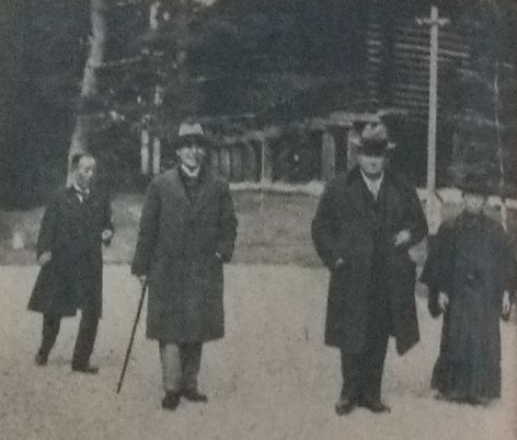 1921年の訪日の際、奈良を訪れたノースクリフ卿